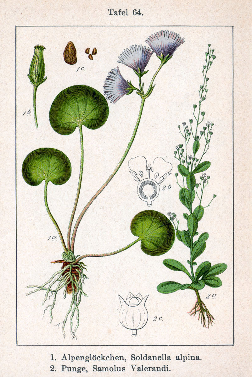 1. Soldanella alpina L. 2. Samolus valerandi L. Original Description 1. Alpenglöckchen, Soldanella alpina 2. Punge, Samolus valerandi